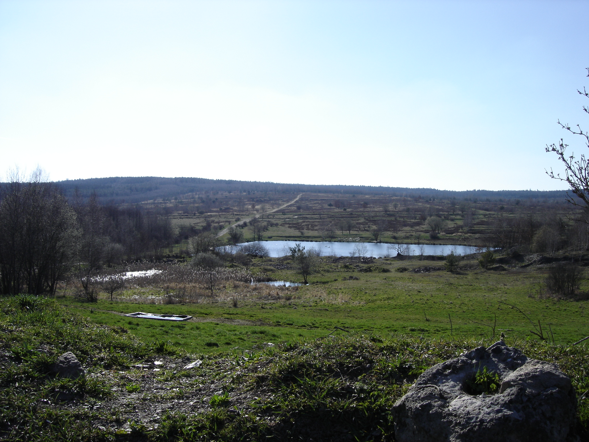 Naturschutzgebiet „Kauschwitzer Heide“ bei Schneckengrün bzw. Kauschwitz im Vogtlandkreis